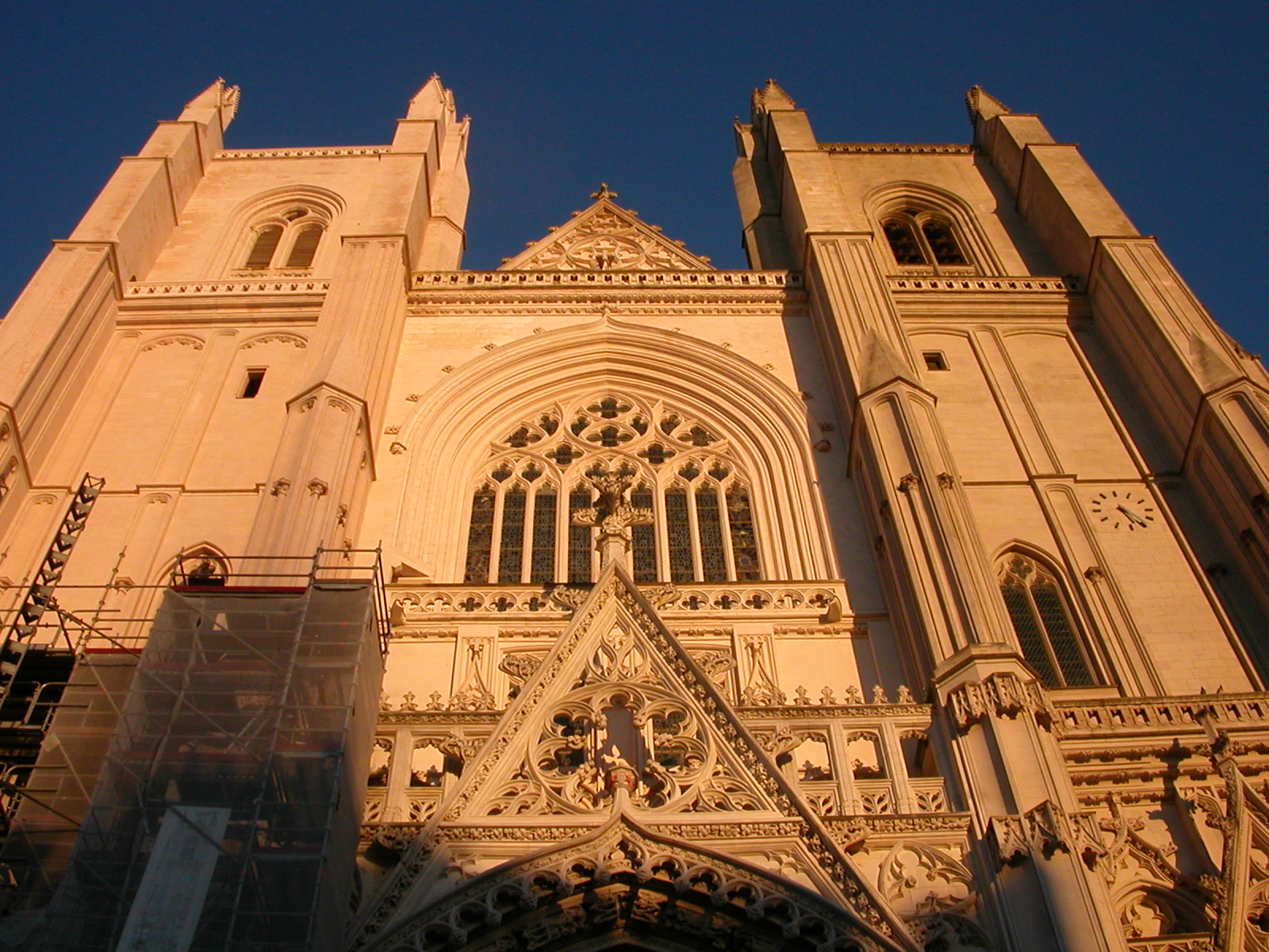 Façade de la Cathédrale Saint-Pierre de Nantes